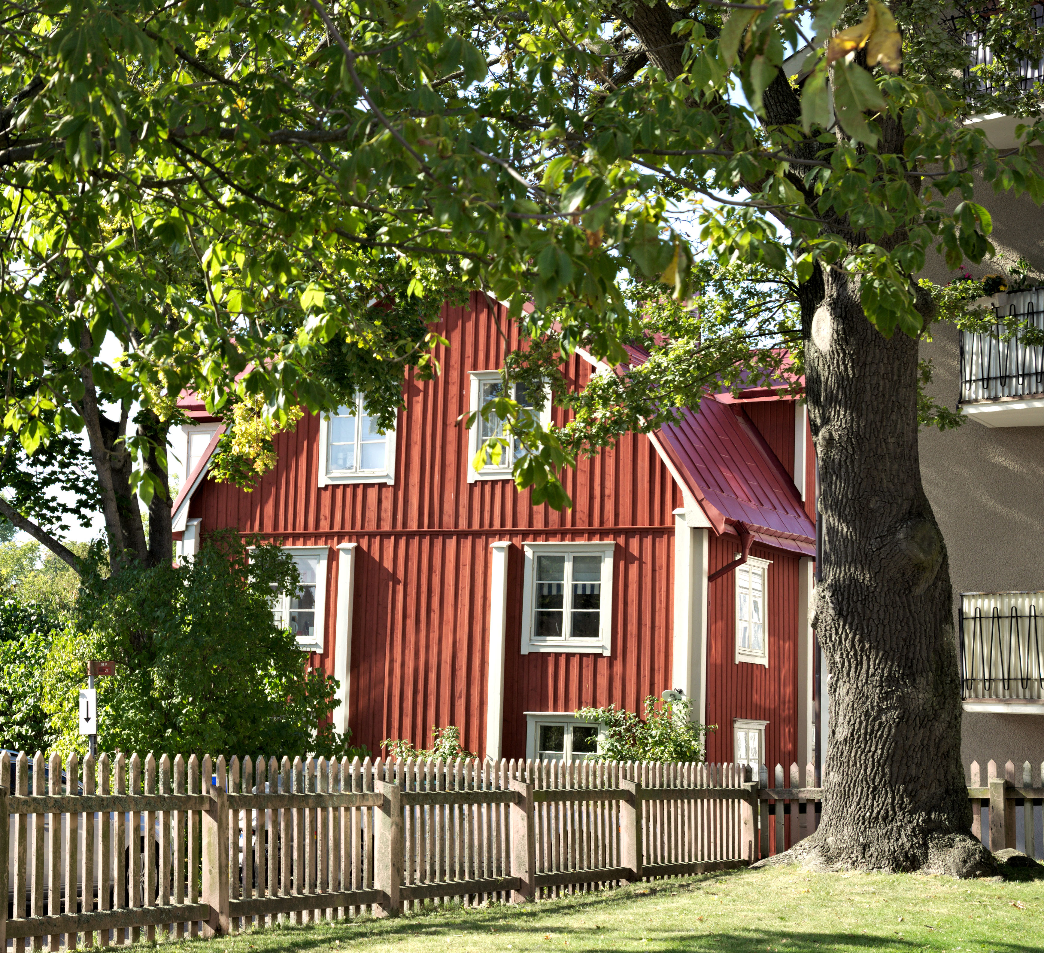 Löwenströmska borgarhuset med trädgård i Vaxholm - vy från västnordväst